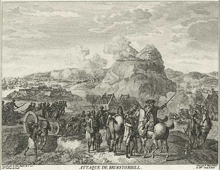 Nicolas Ponce (Français, 1746-1831) d'après Jean-Baptiste Le Paon (Français, 1738-1785): Attaque de Brimstomhill, gravure, 1785 au plus tard, inscription dans la marge inférieure, à gauche : Dessiné par Le Paon peintre de S. a S. Mgr Le Prince de Condé ; en bas à droite : Gravé par N. Ponce graveur de Mgr Comte d'Artois.